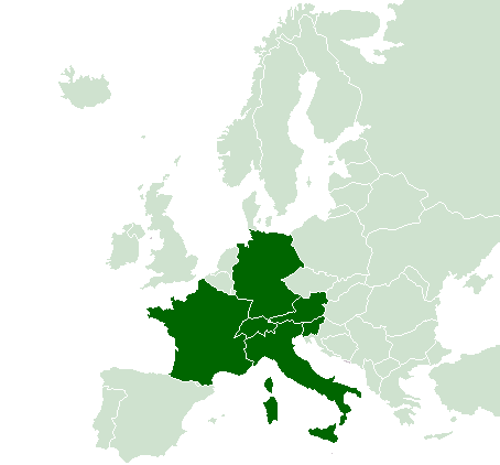 Mapa krajów alpejskich. Autor: Jacek Marszałek